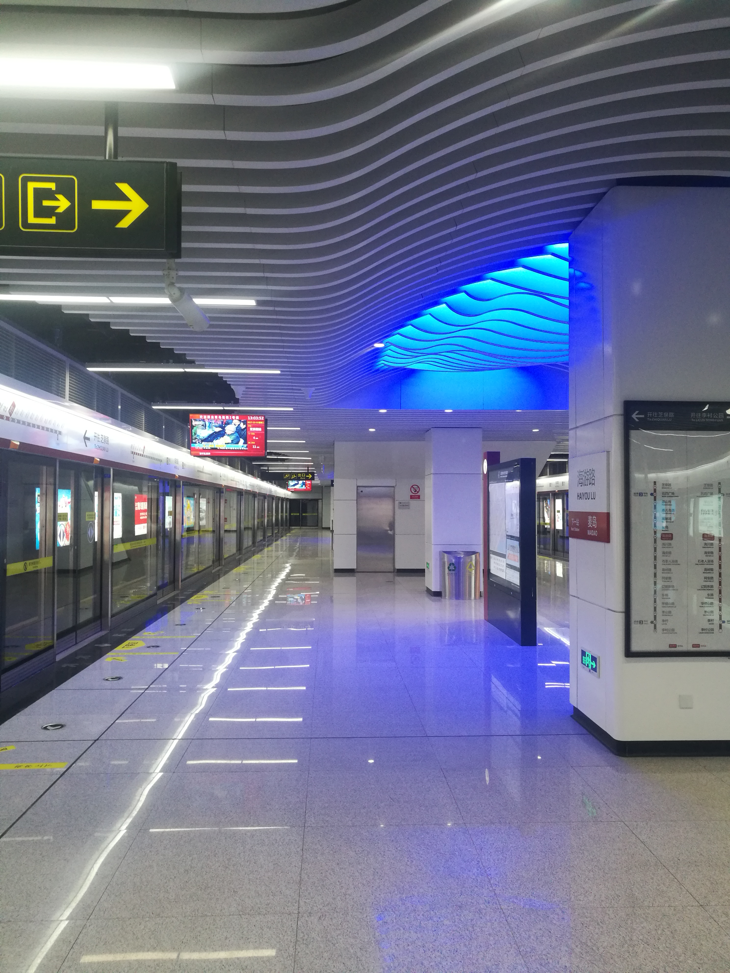 海游路站下行站台